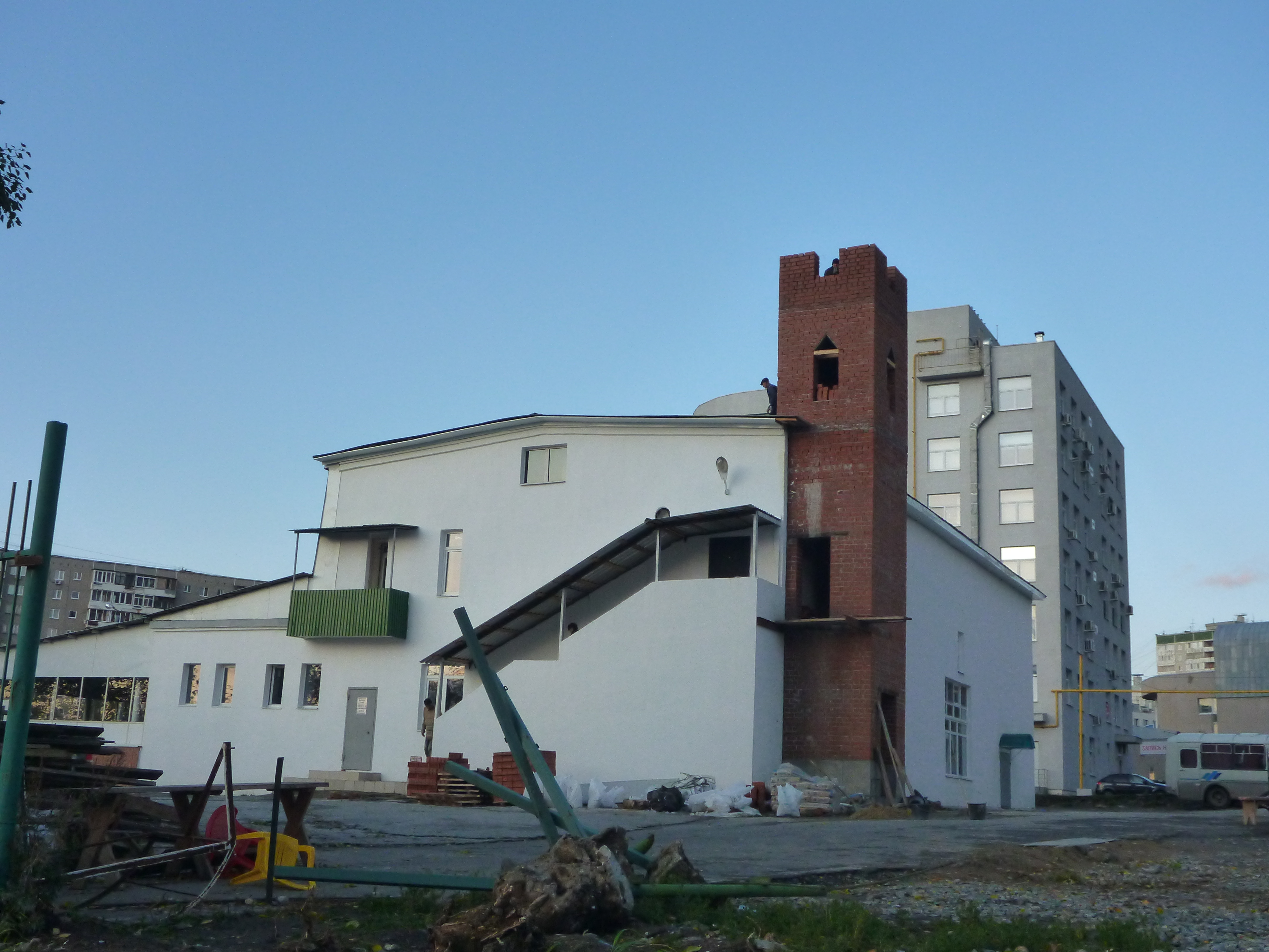 Мечеть имени Абу Ханифы Екатеринбург 22 сентября 2019 года